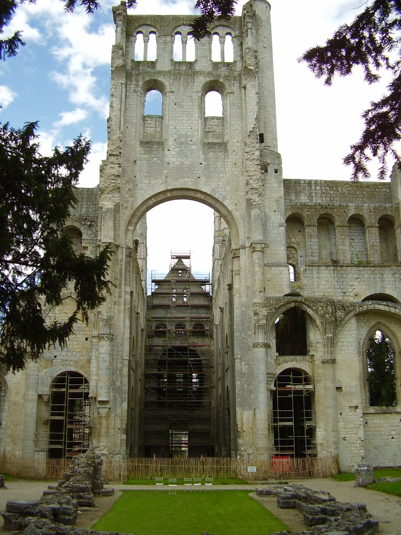 Abbaye de Jumièges, the most beautiful ruins in France